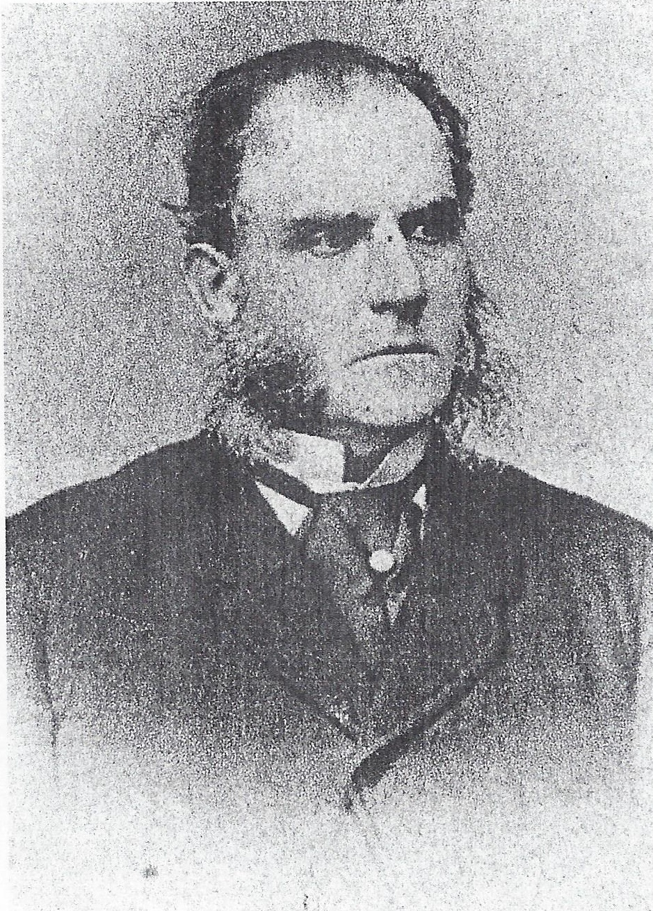 Porträtfotografie von Gtaf August Mortimer Joachim von Maltzan (1823-1878)